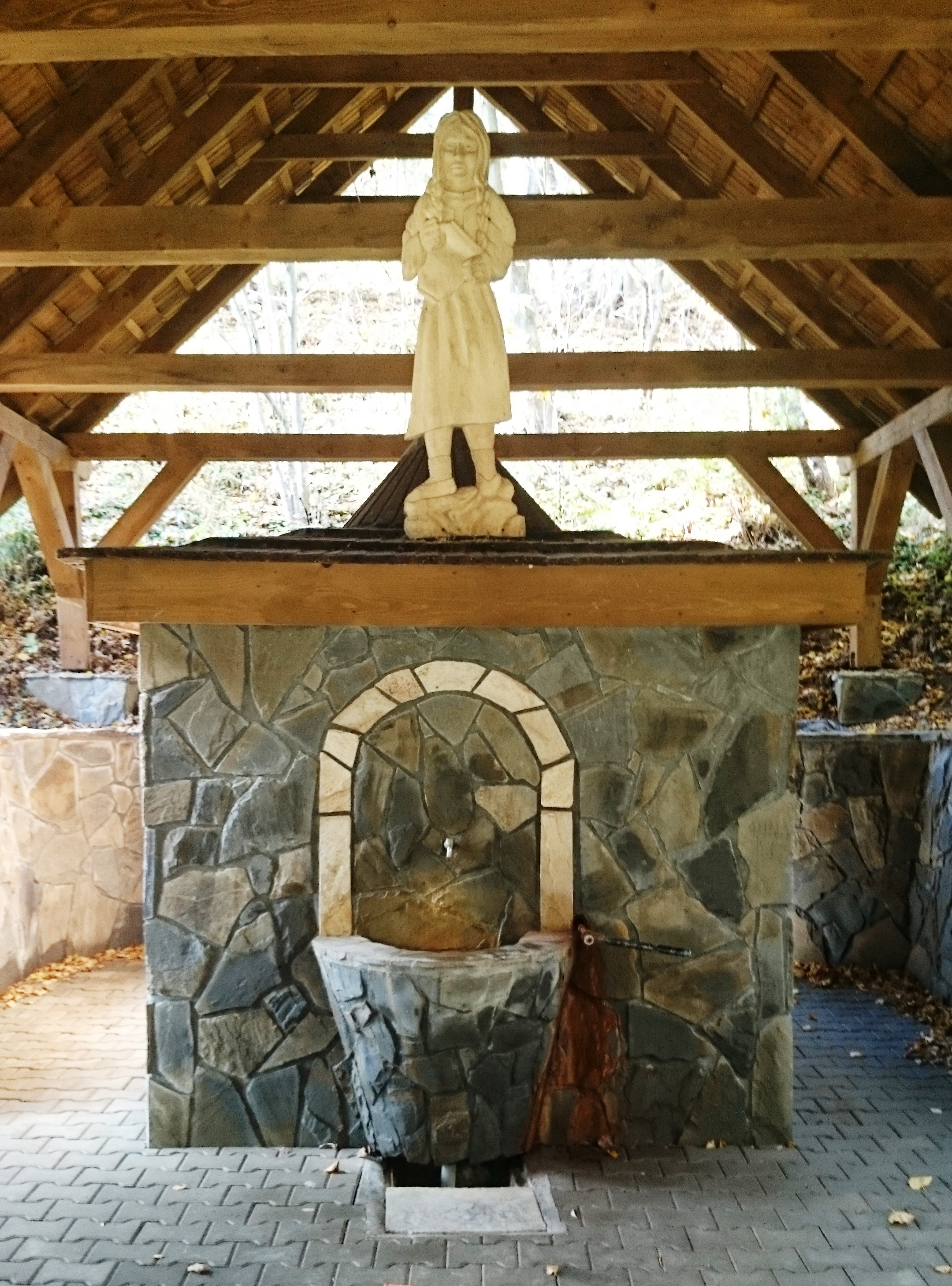 Źródło "Maria" na przedłużeniu ulicy Źródlanej w Krościenku nad Dunajcem